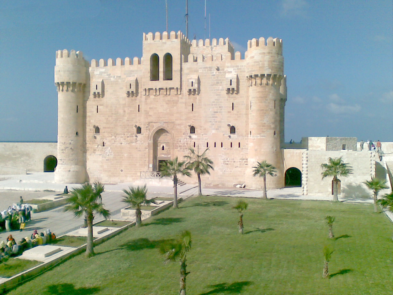 قلعة قايتباى الاسكندرية - جمهورية مصر العربية Citadel of Qaitbay - Alexandria - Egypt